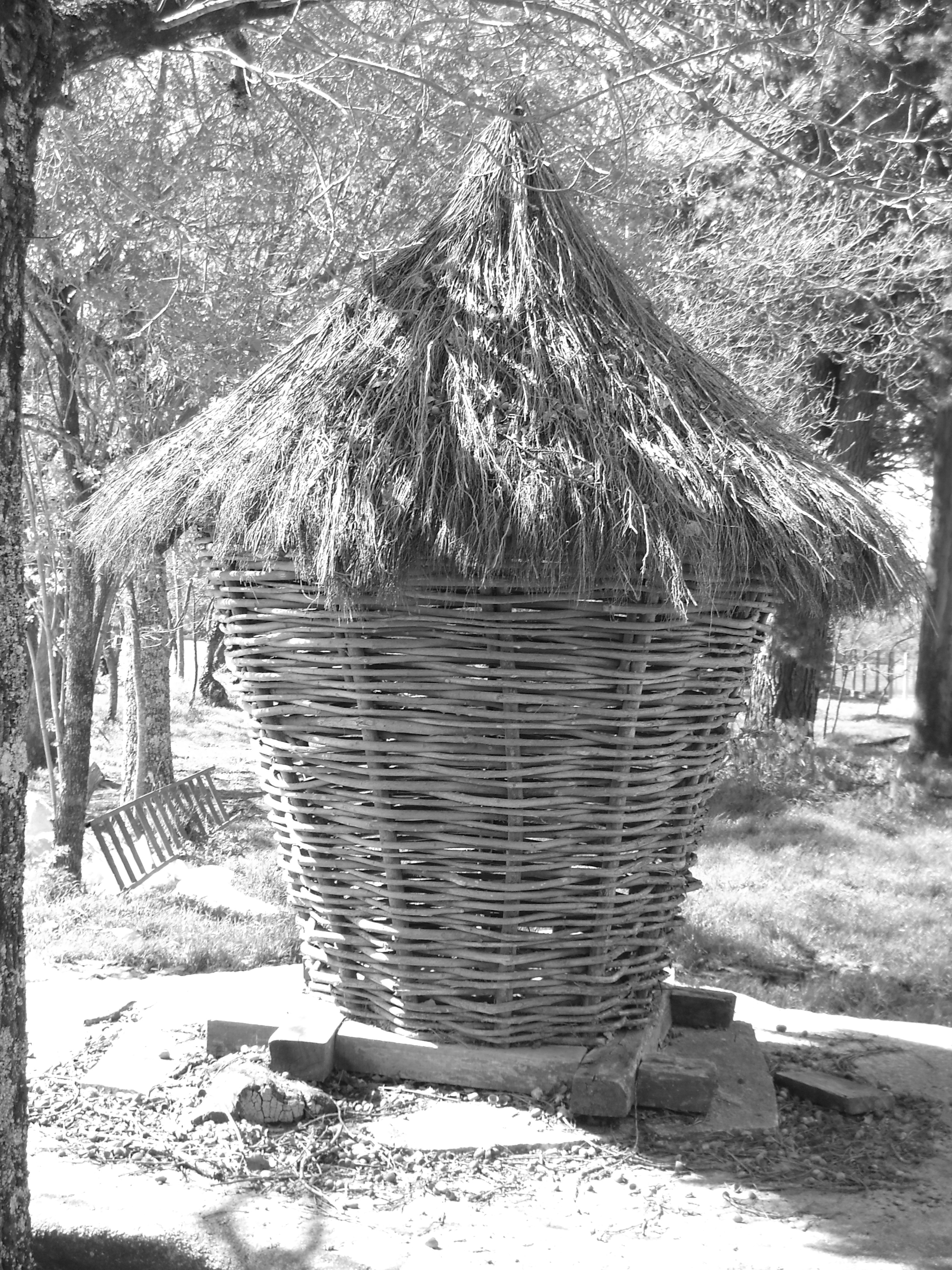 Cabazo, Orosa, Palas de Rei